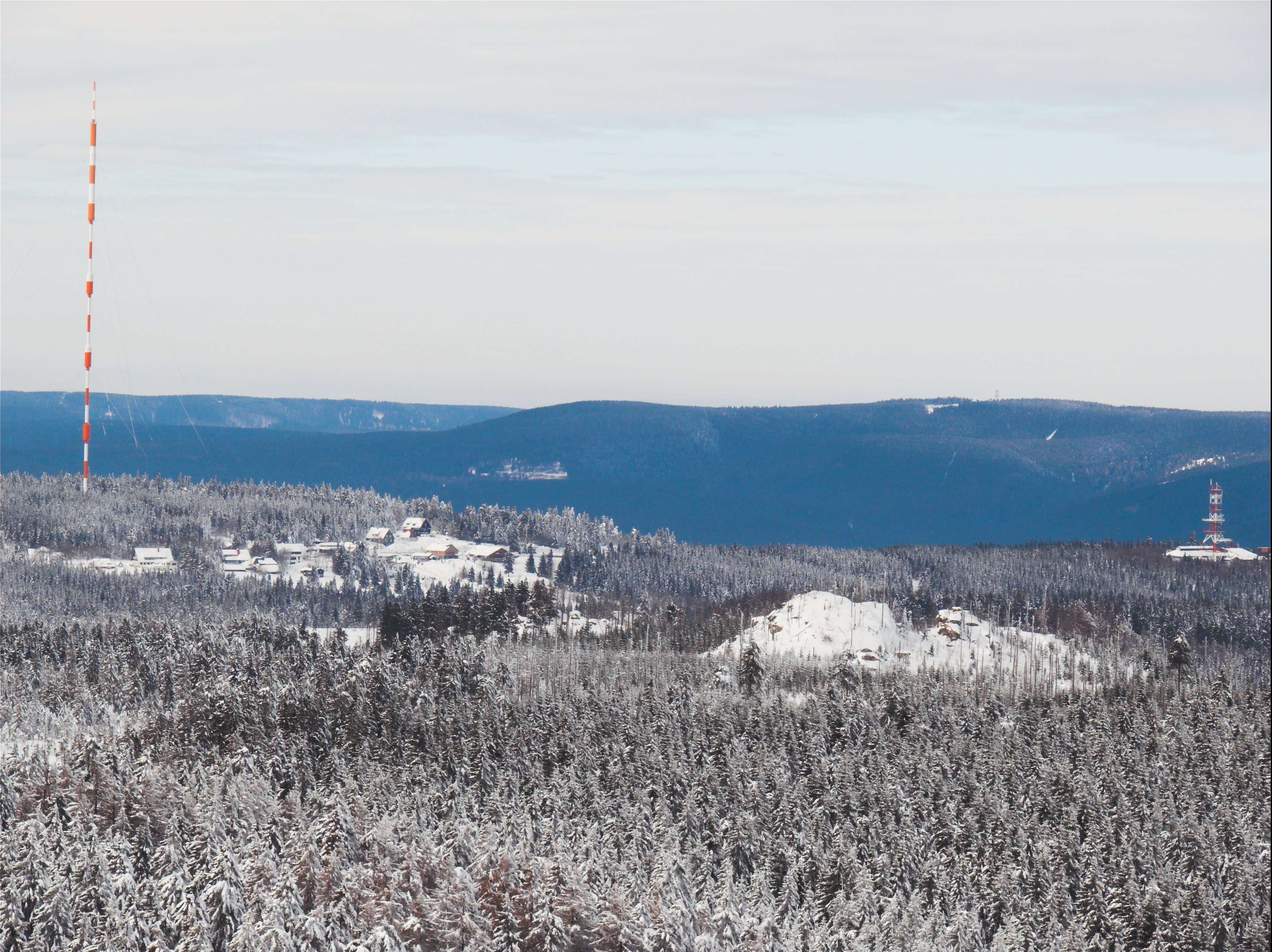 Winterlicher Blick auf Torfhaus vom Goetheweg (Brocken)